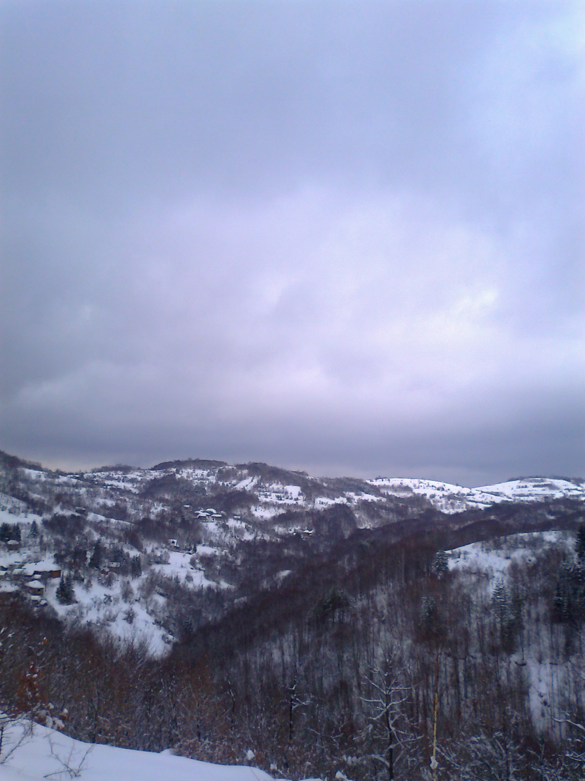 Златићево фебруара 2012. године.